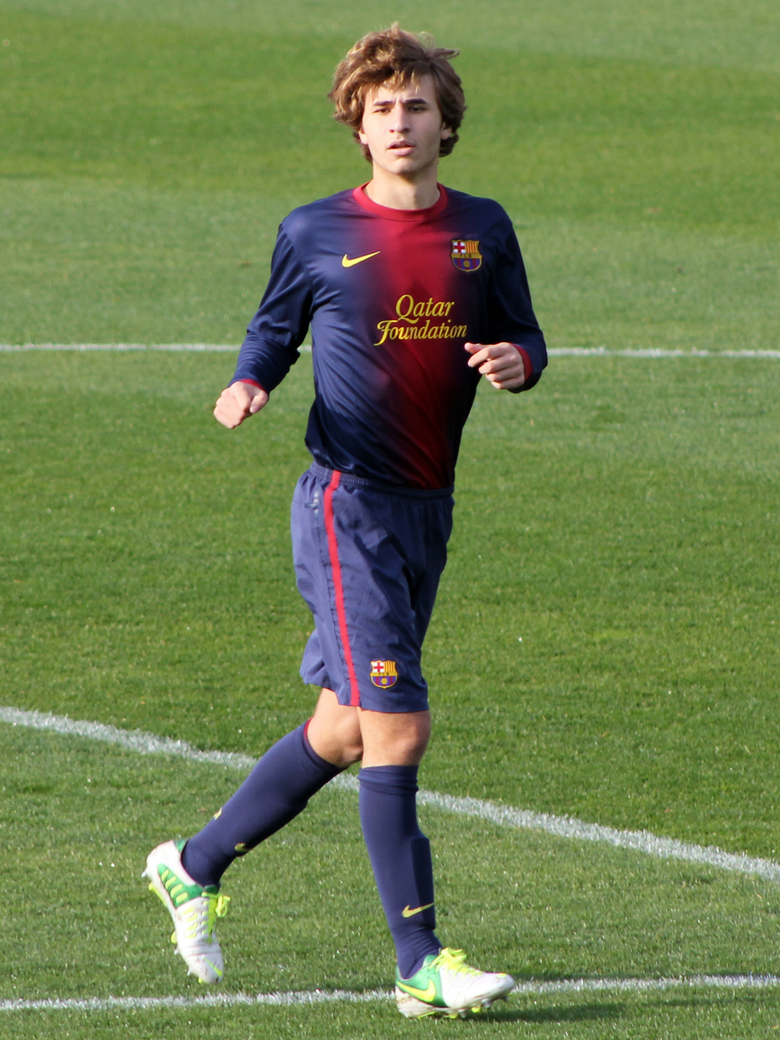 Foto realizada por Javier Segura (@castroquini)